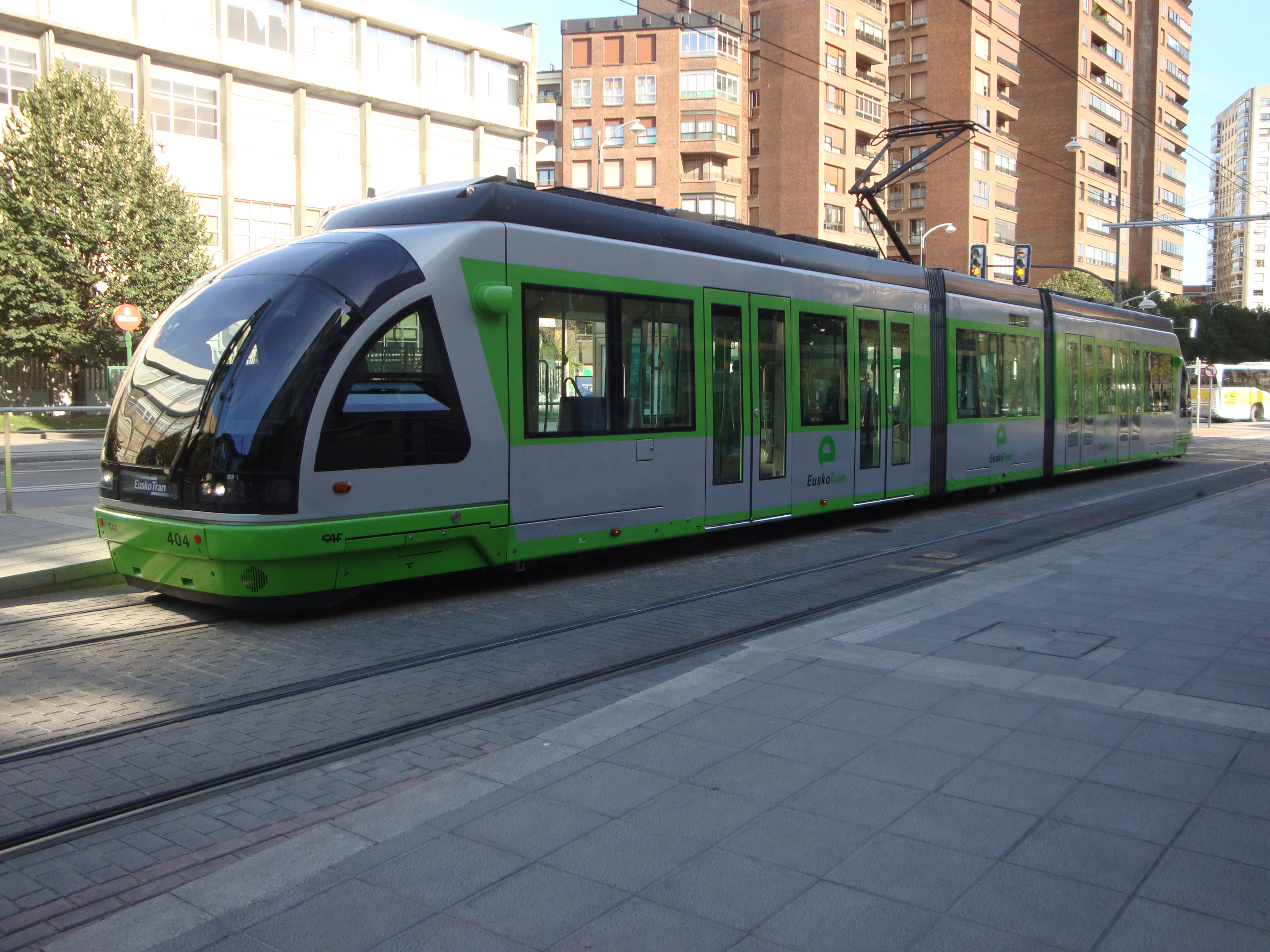 Bilboko tranbia